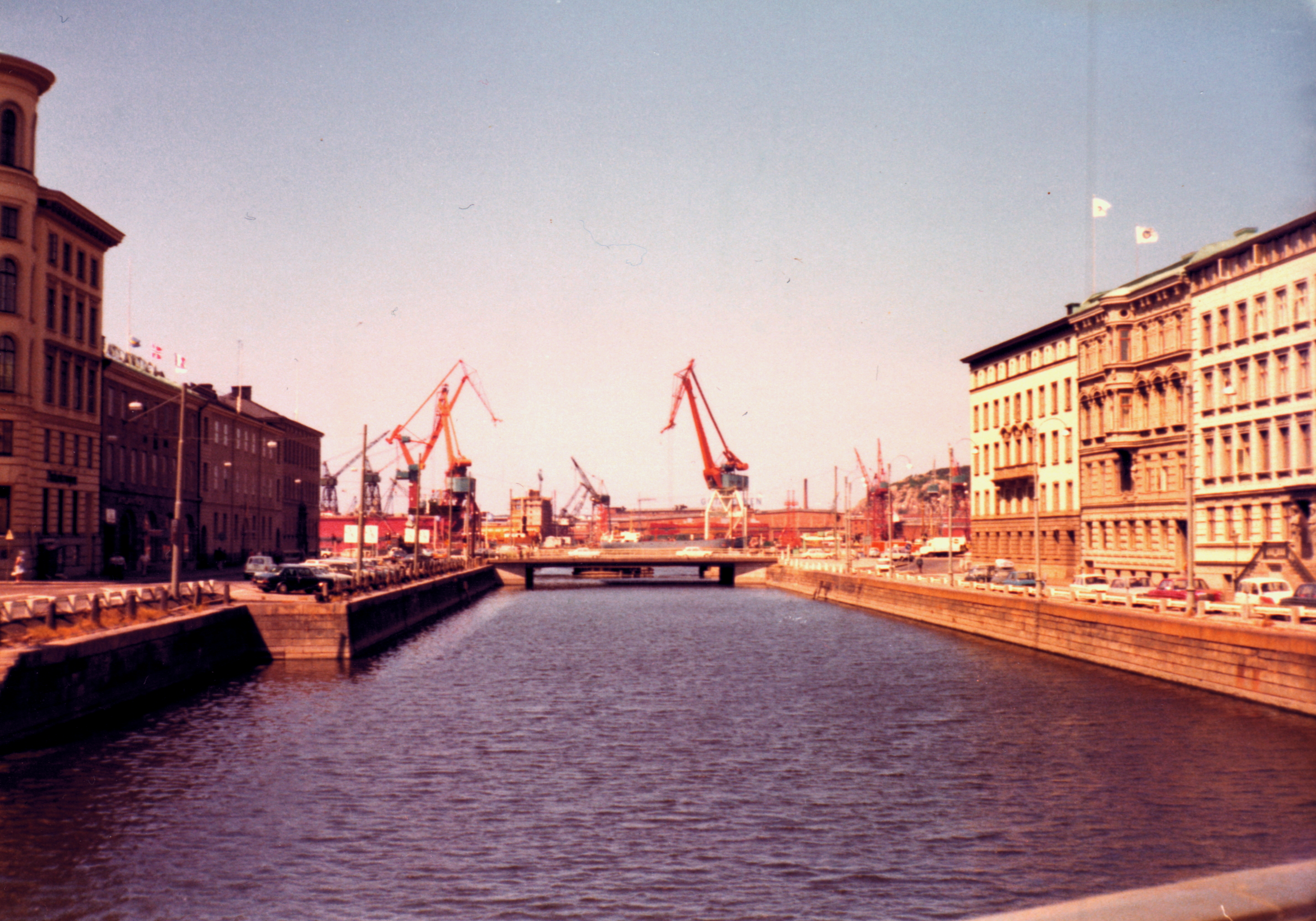 Stora Hamnkanalen i Göteborg, ca 1985